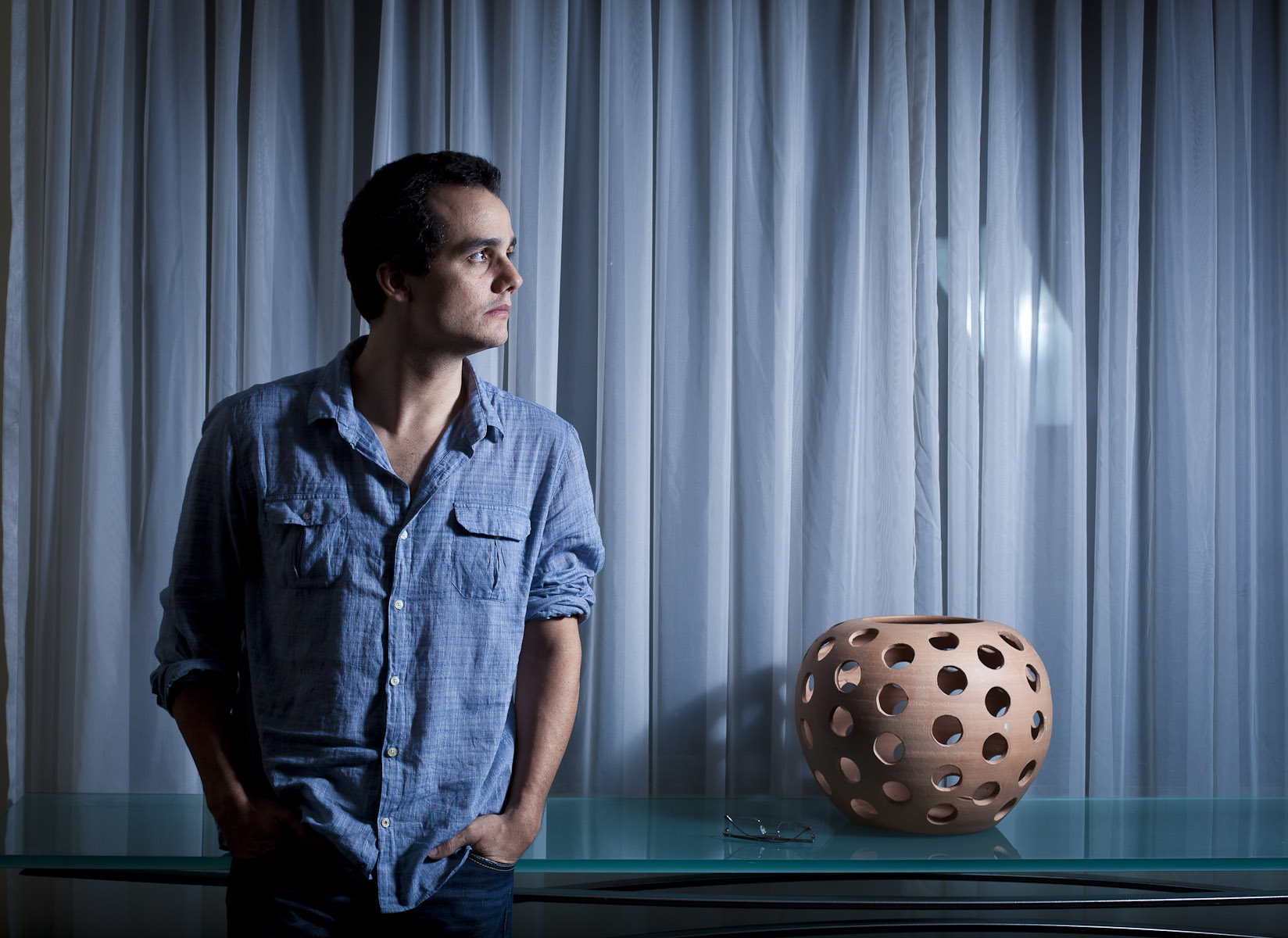 SÃO PAULO, SP, BRASIL, 04-03-2013: O ator Wagner Moura, em retrato no hotel Caesar Business Paulista onde atendeu a imprensa para falar da estreia do filme 'A Busca'. (Foto: Zé Carlos Barretta/Folhapress ILUSTRADA)